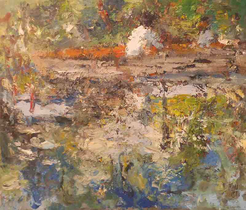 Row the Boat (120 x 140 cm)